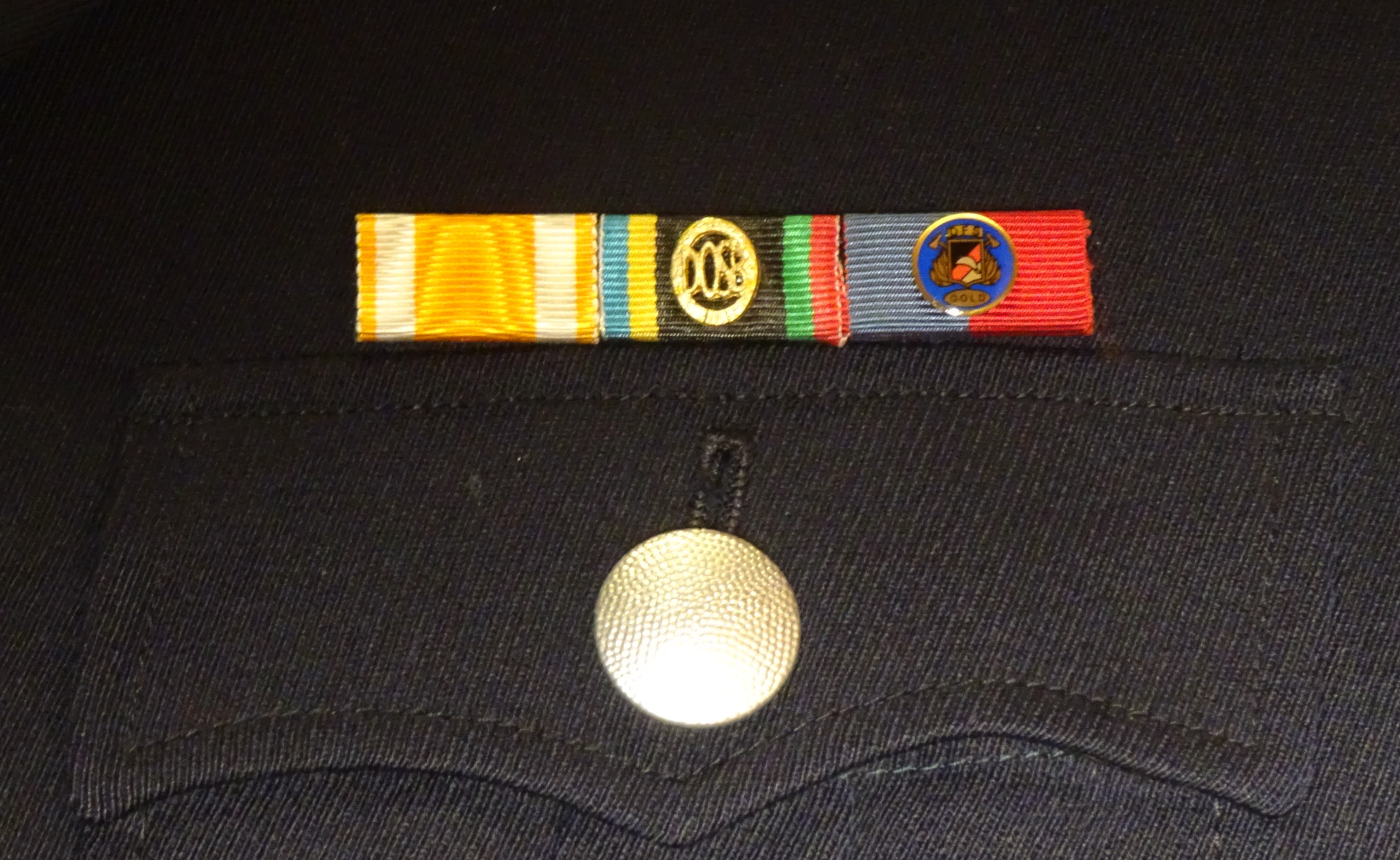 Orden *Ehrenzeichen *Feuerwehr **Bandschnallen von links Rettungsmedaille, Deutsches Olympisches Sportabzeichen in Gold, Deutsches Feuerwehr Fitnessabzeichen in Gold